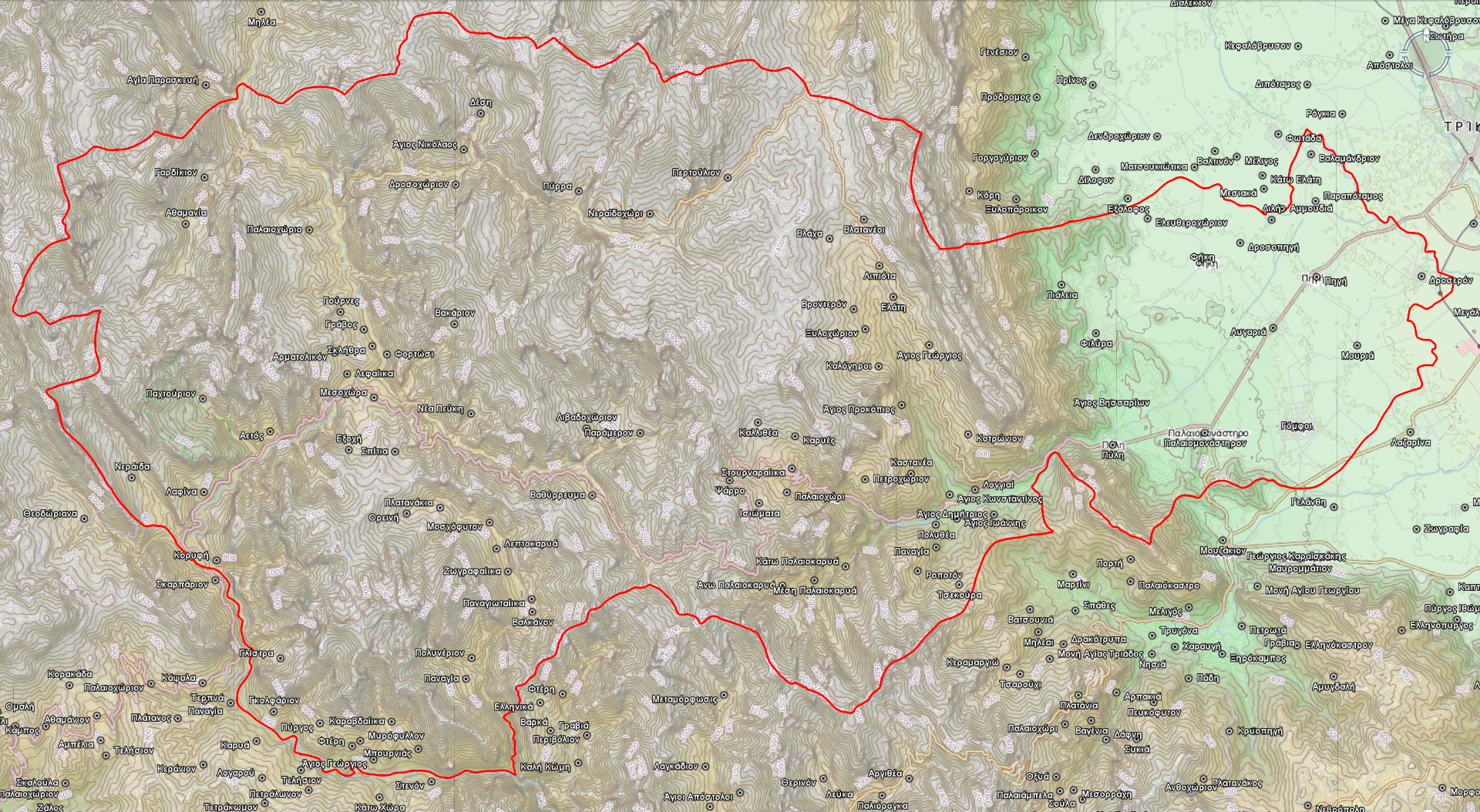 Τοπογραφικός χάρτης του Δήμου Πύλης